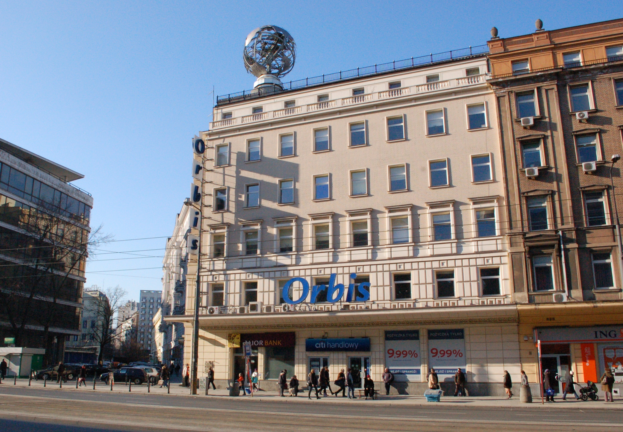 Orbis Warschau, Jerozolimskie